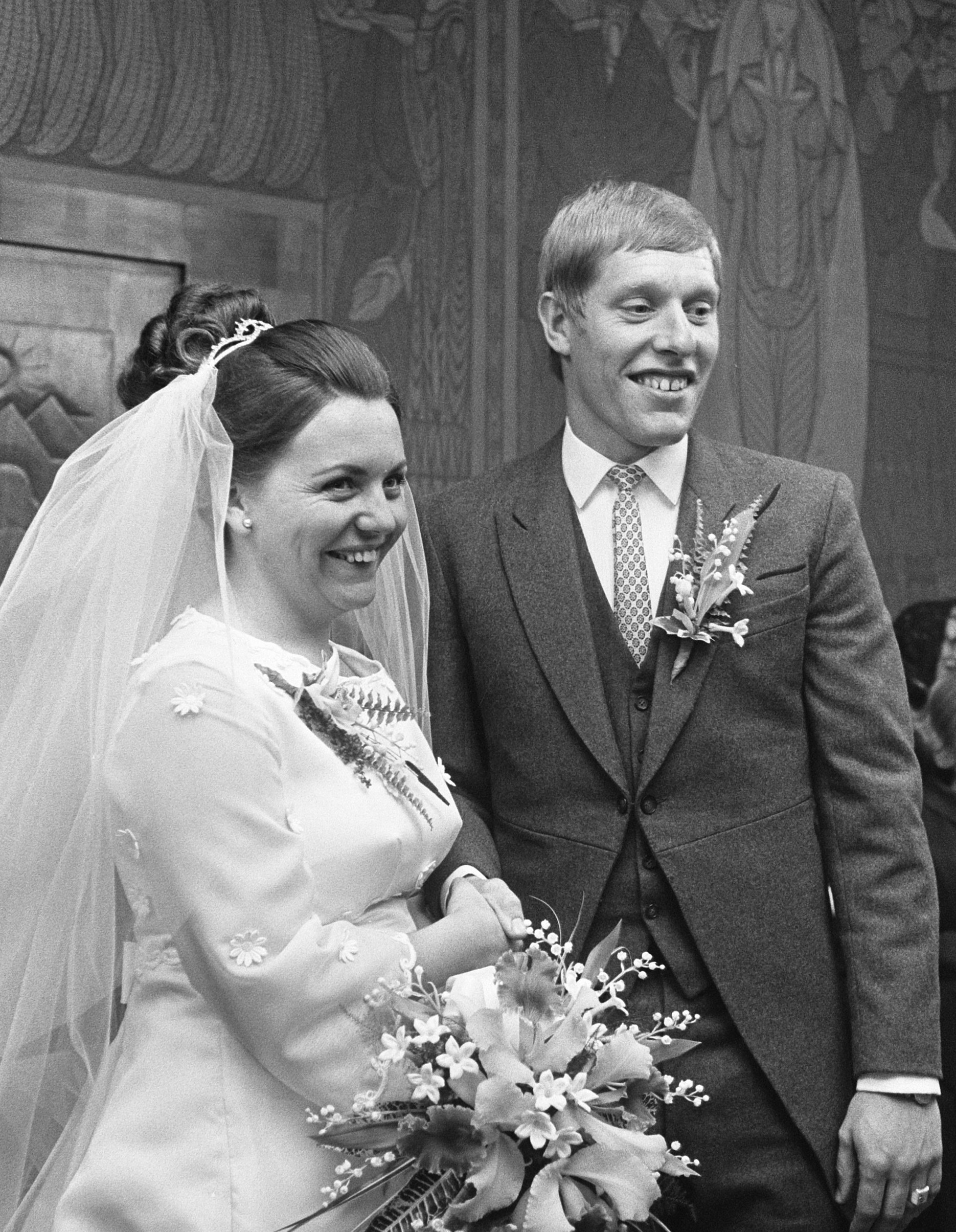 Tonny Pronk , voetballer Ajax, trouwt met Marjan Meier Stadhuis Amsterdam